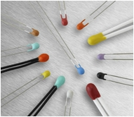 Varios ejemplos de termistores con encapsulado tipo perla (bead)